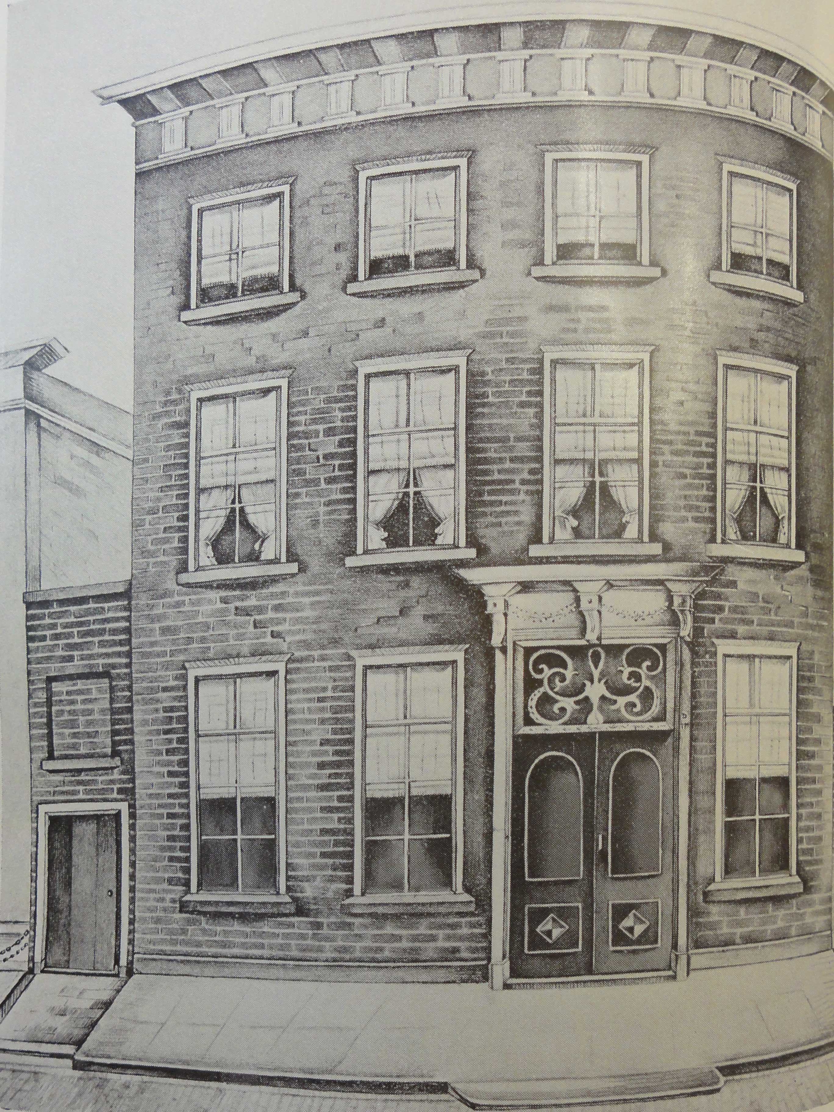 Aquarel Huis "De Crabbe", uitgeverij Nijhoff, Bakkerstraat te Arnhem